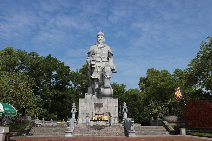 Tượng đài Trần Hưng đạo, xã An Sinh, huyện Kinh Môn, tỉnh Hải Dương